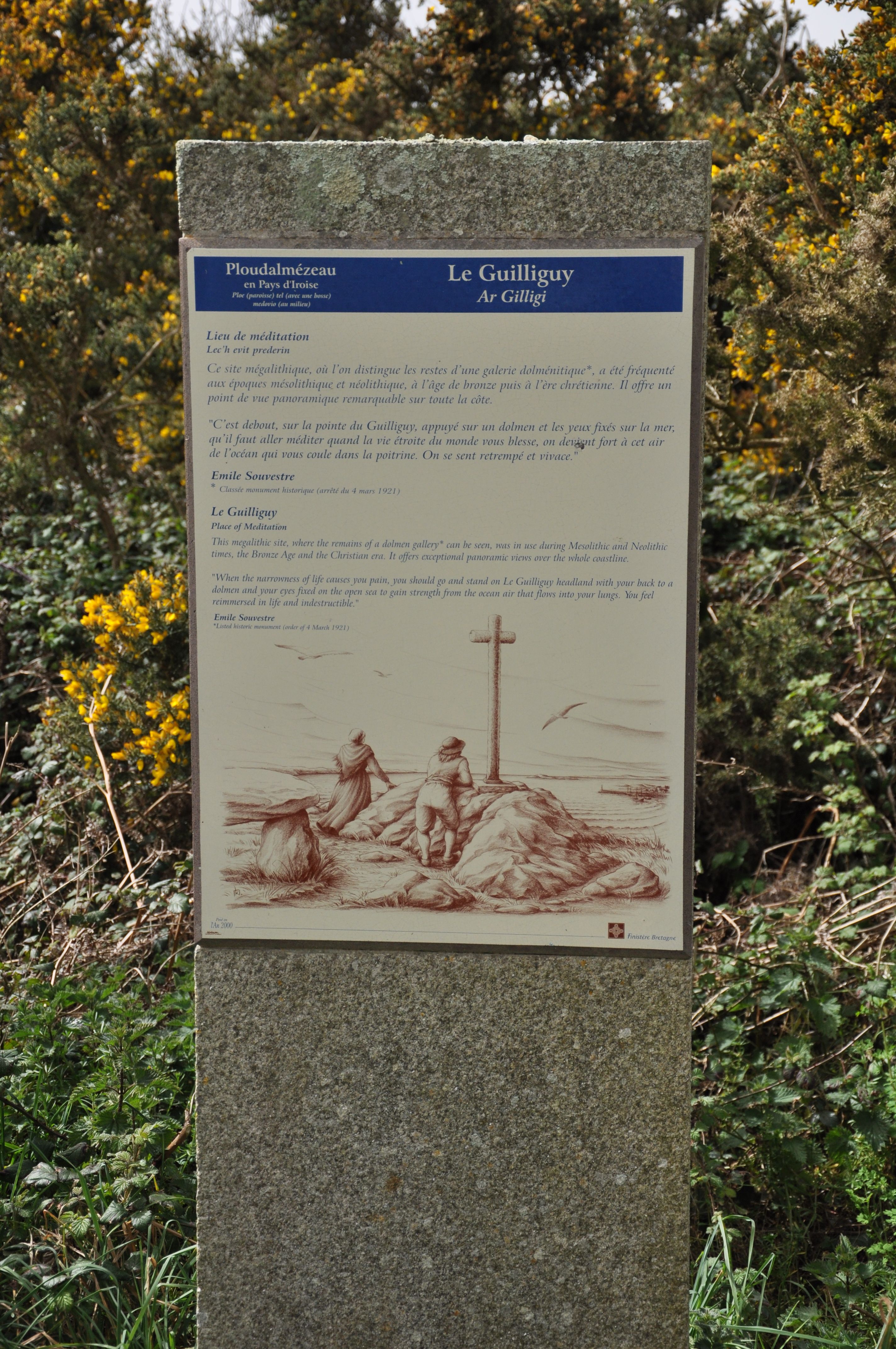 Panneau d'indication touristique concernant la croix du Guilliguy à Portsall (29), France.